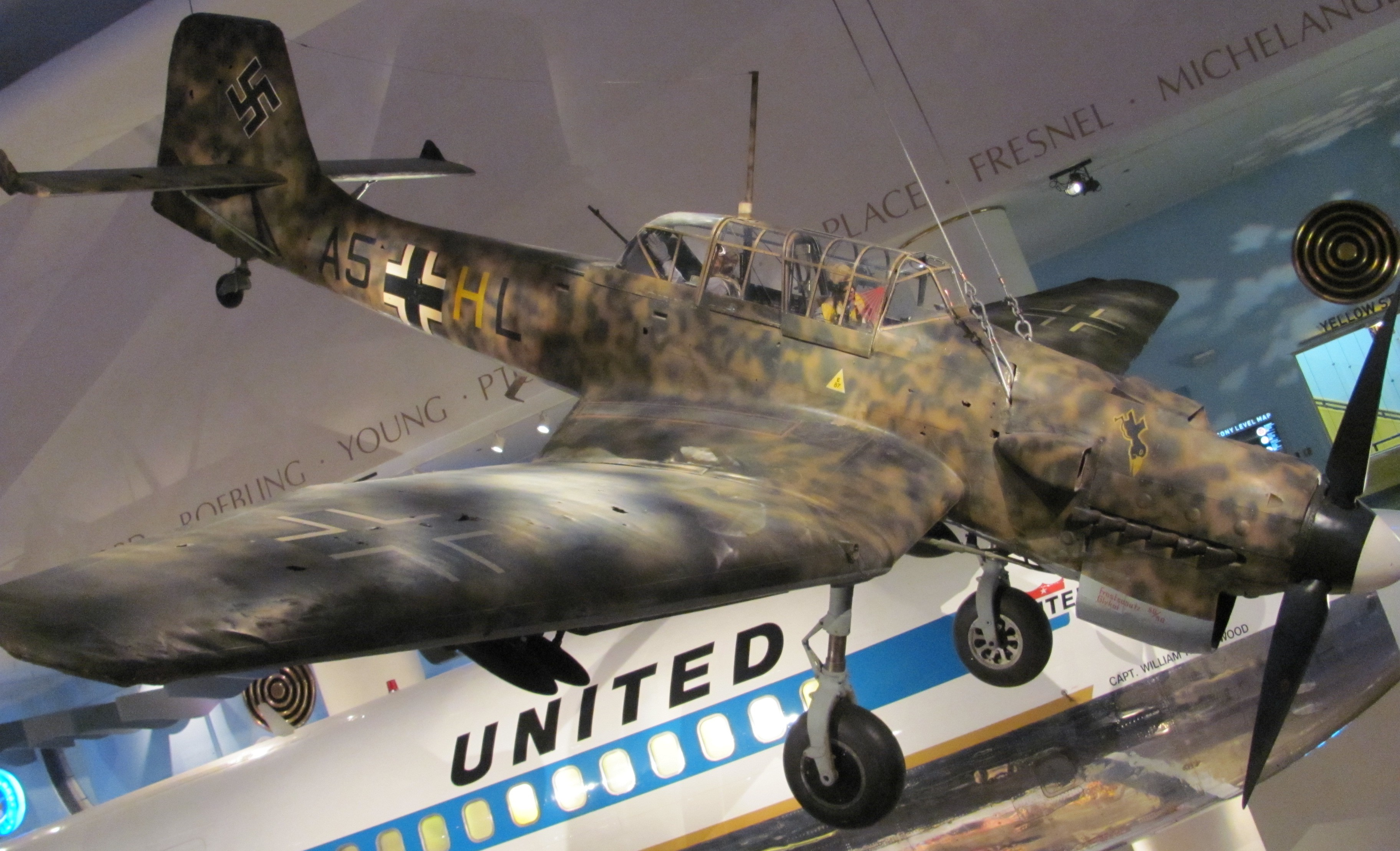 Junkers Ju 87 im Museum of Science and Industry Chicago